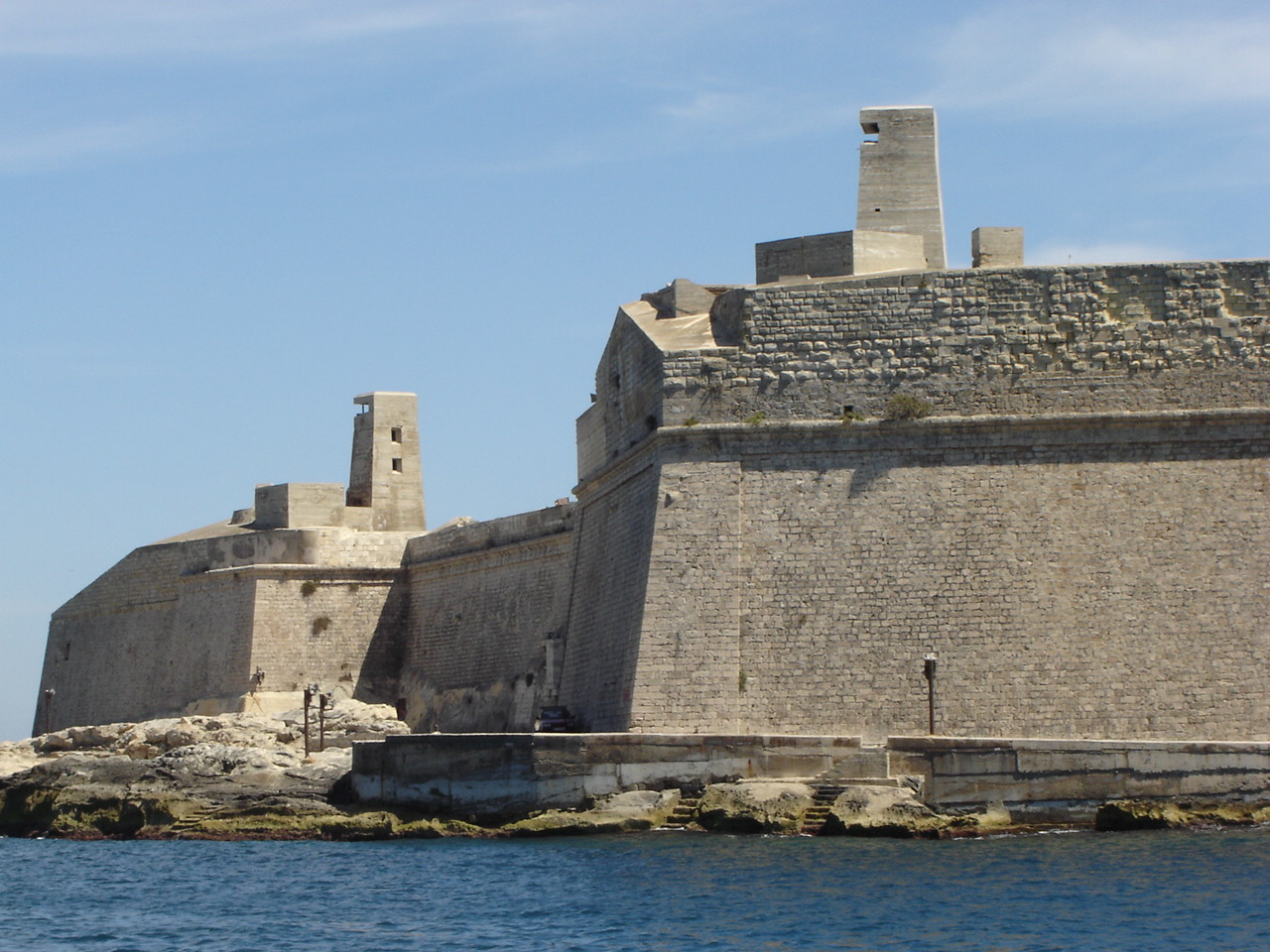 Boote und marine Anlagen, Zubehör und Details. Malta, April 2006. Deklaration muß erst ermittelt werden, daher Hochladung hier.